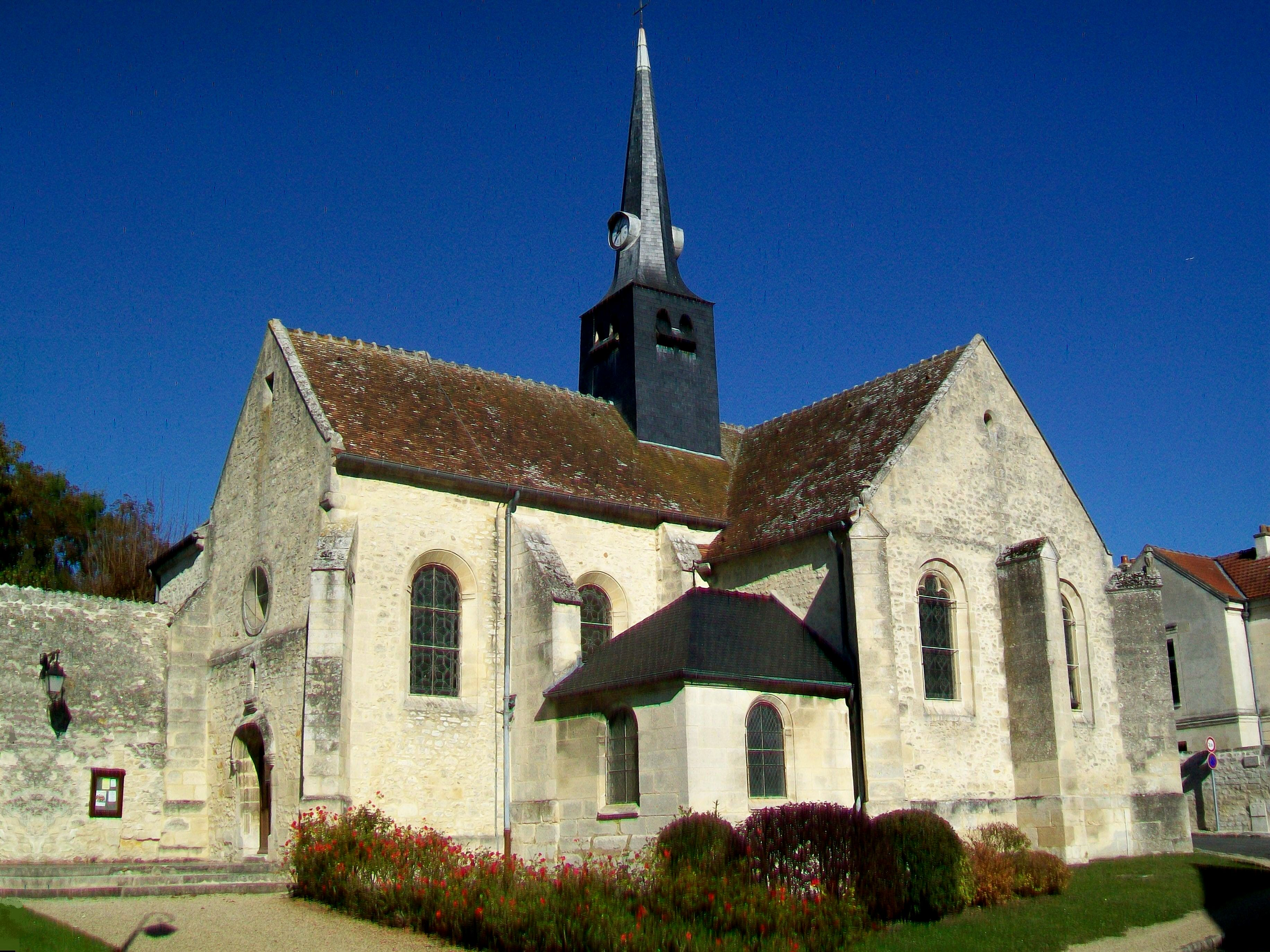 L'église Saint-Gervais à Courteil (60).